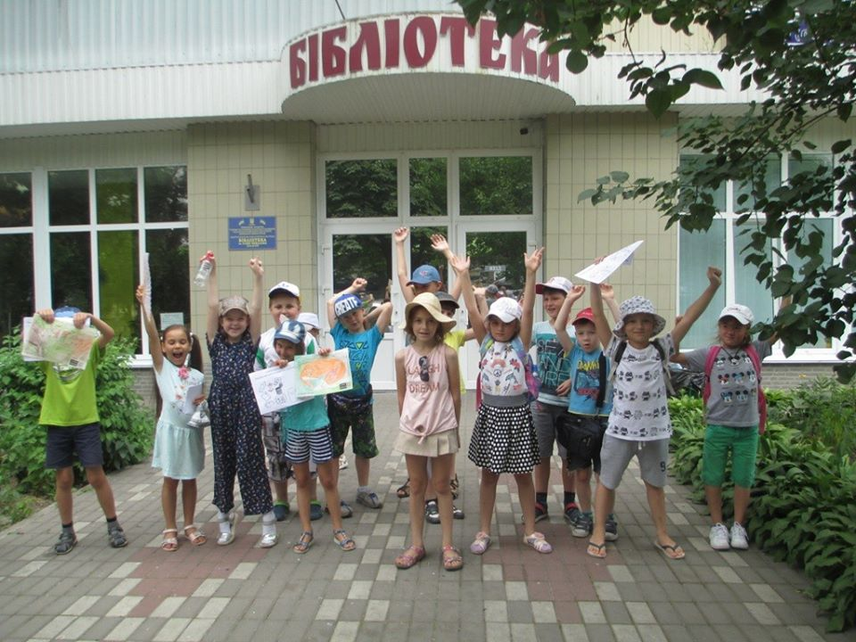 Бібліотека